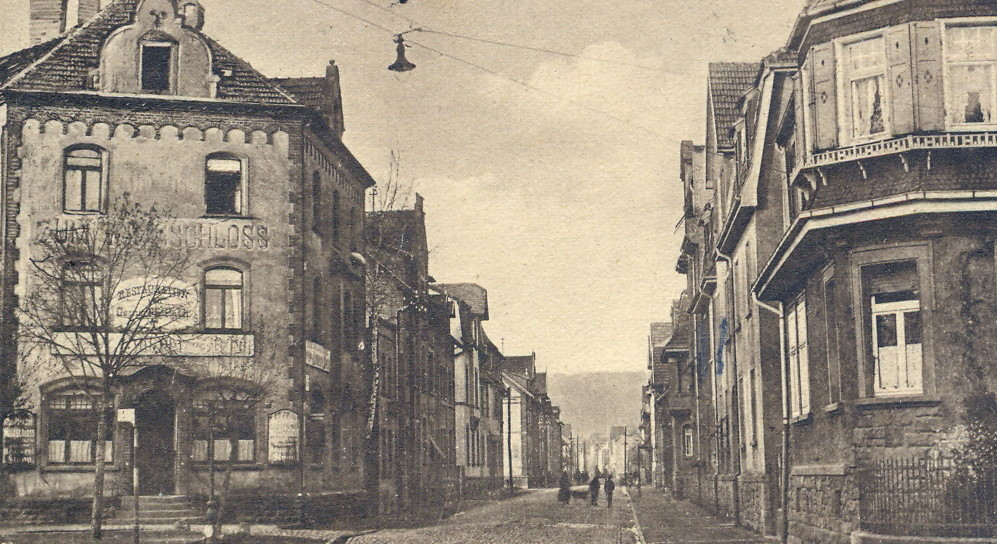 Hauptstrasse von Enkheim (1934), jetzt Ffm-Bergen-Enkheim